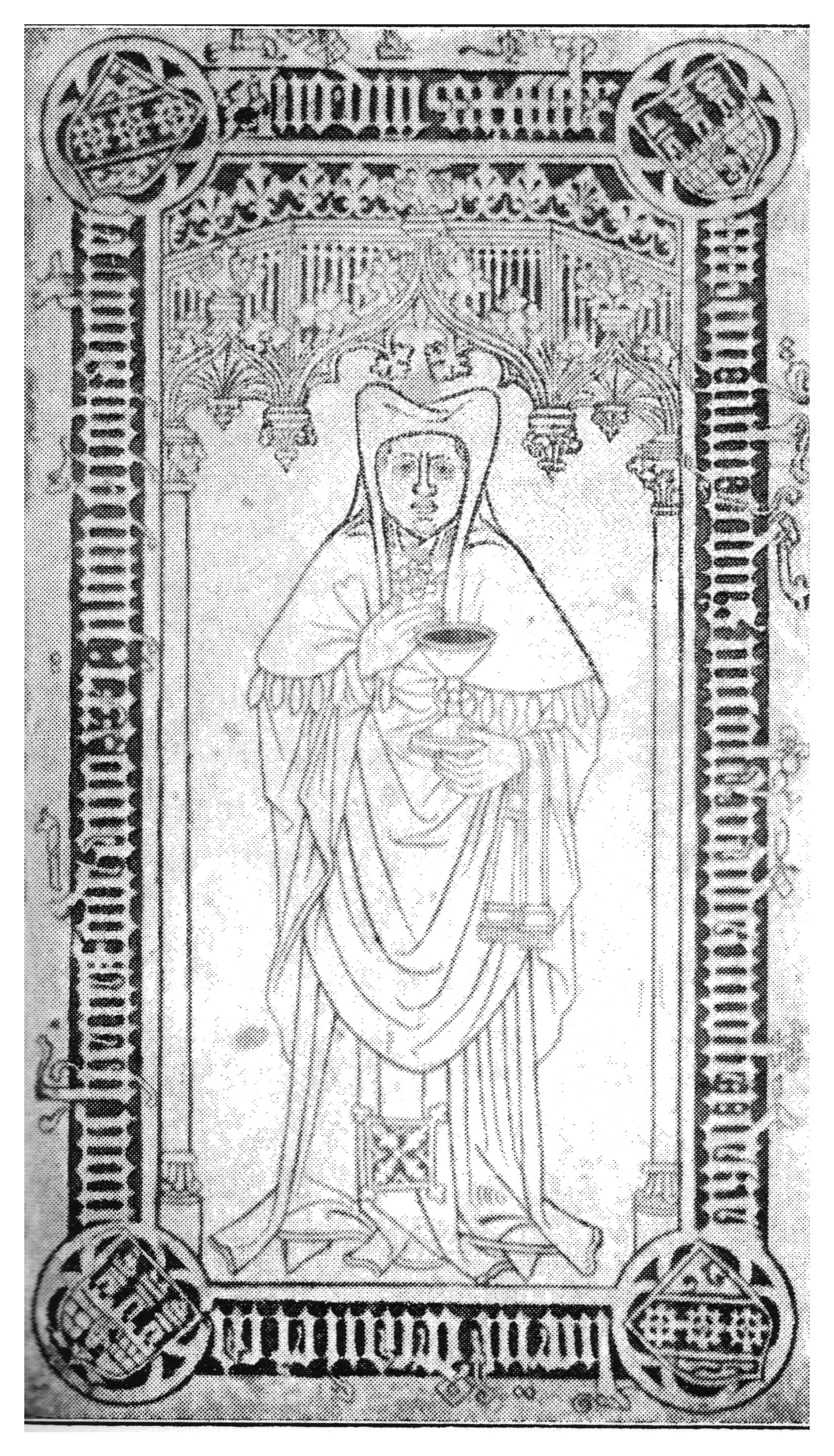 Grabplatte des 1464 verstorbenen Lübecker Domherrn Nikolaus van der Molen im Lübecker Dom. Corpus: LÜDO172